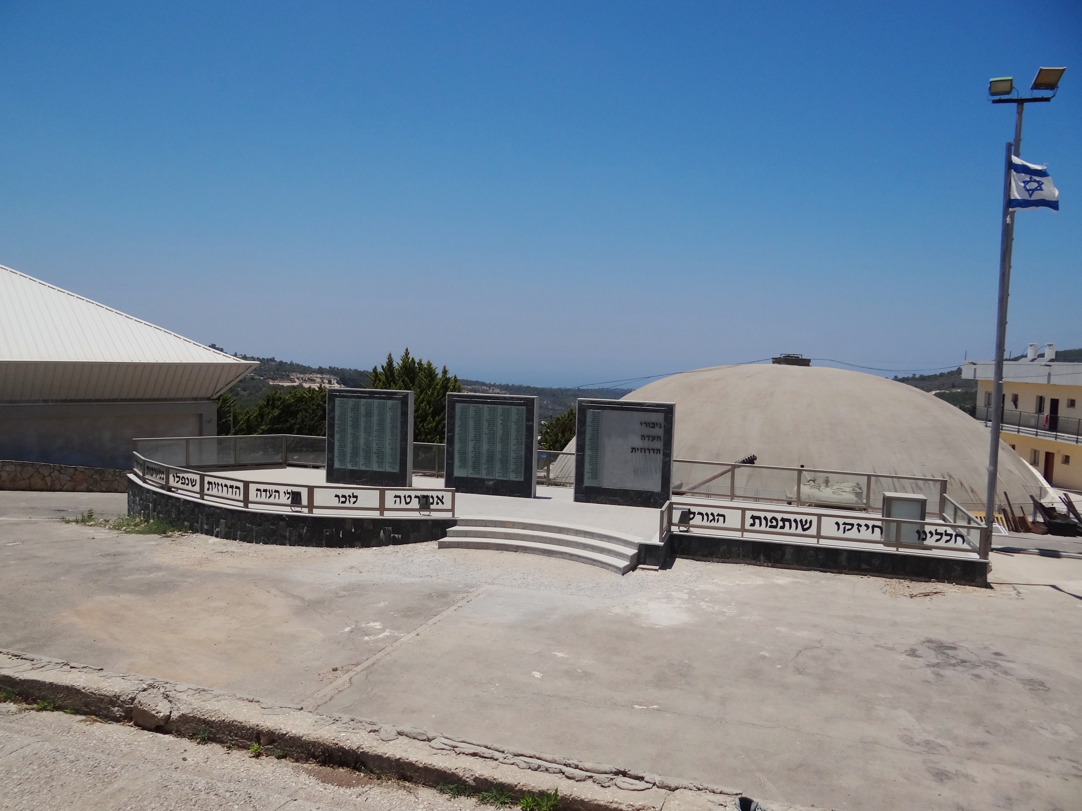 בית אוליפנט בדליית אל כרמל האנדרטה לחללים הדרוזים בחצר